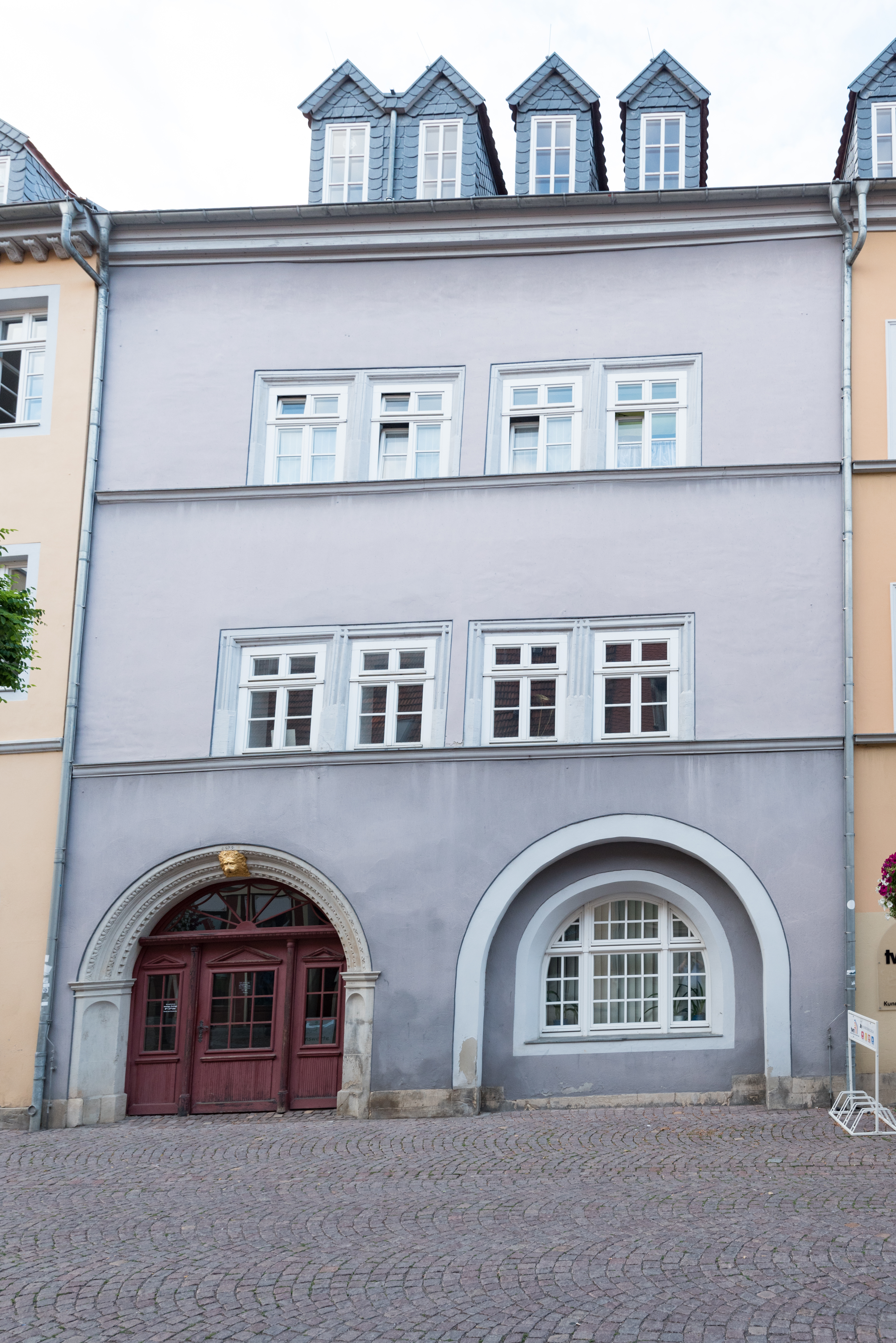 Naumburg (Saale), Salzstraße 15